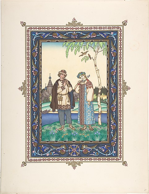 Снегурочка